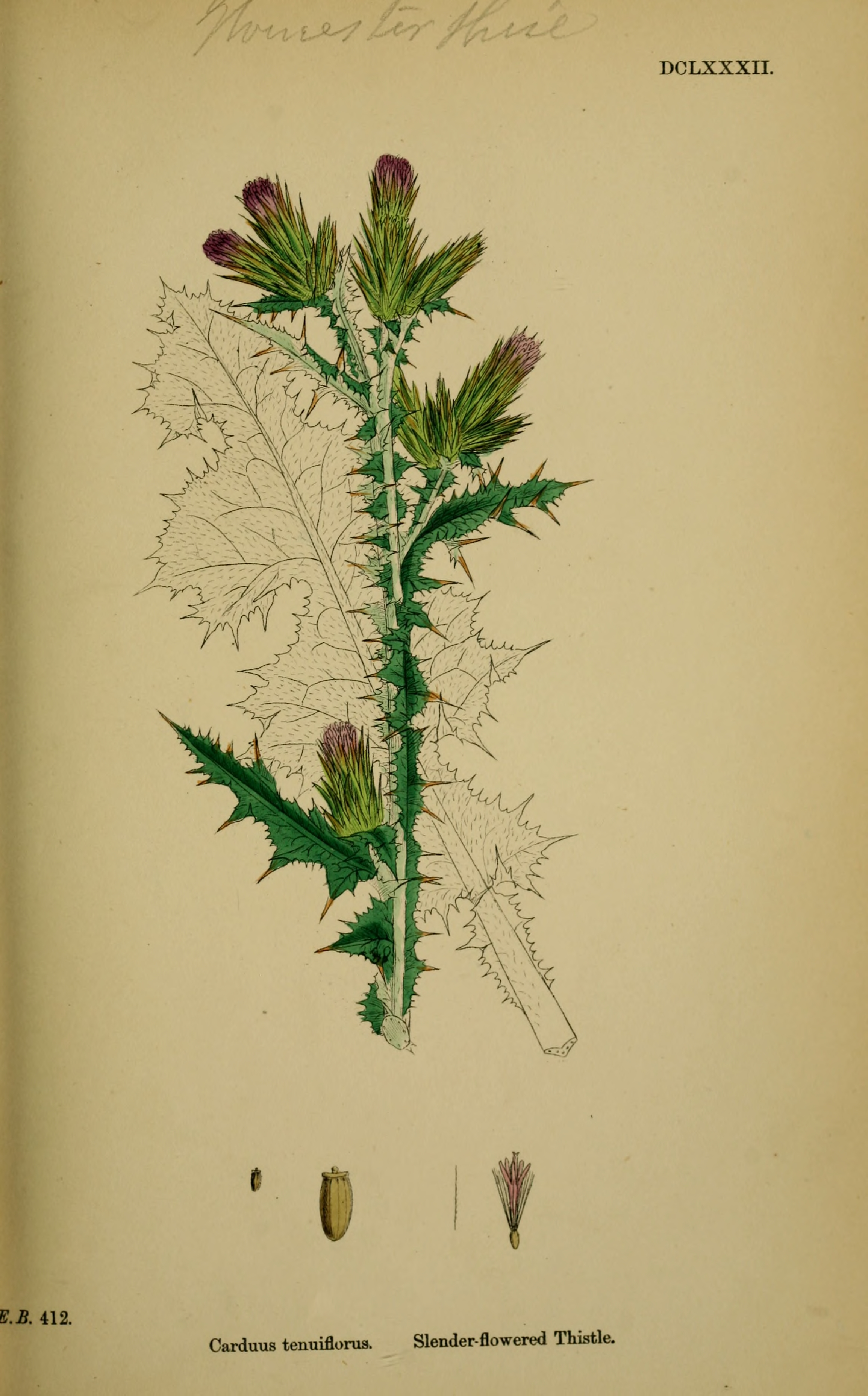 Legende: Oberer Teil der Pflanze. Unteres Stängelblatt. Frucht, Pappus entfernt. Frucht, Pappus entfernt (vergr.). Pappushaar. Röhrenblüte.